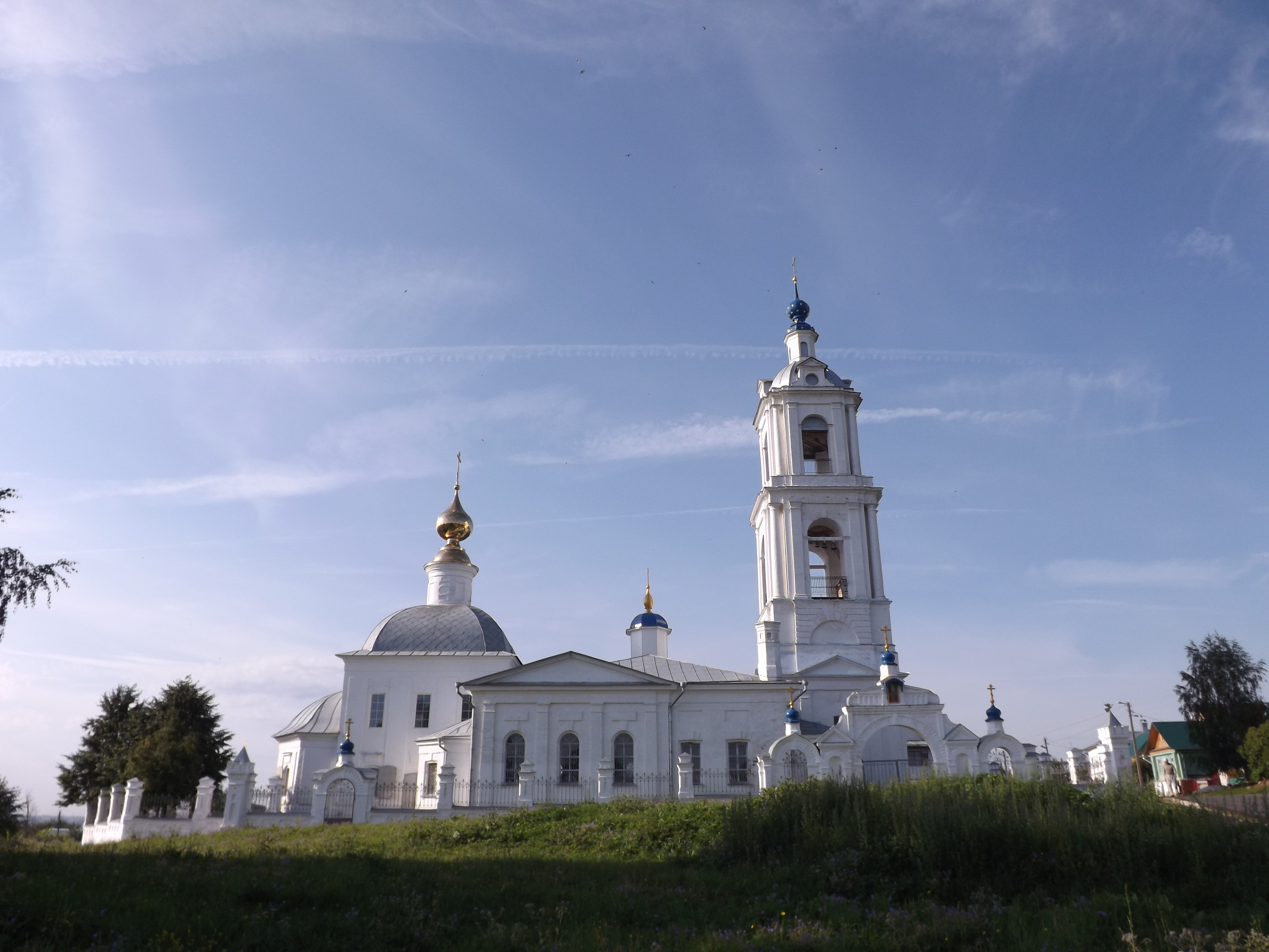 Церковь Преображения с колокольней и оградой: Порецкое, Суздальский район, Владимирская область